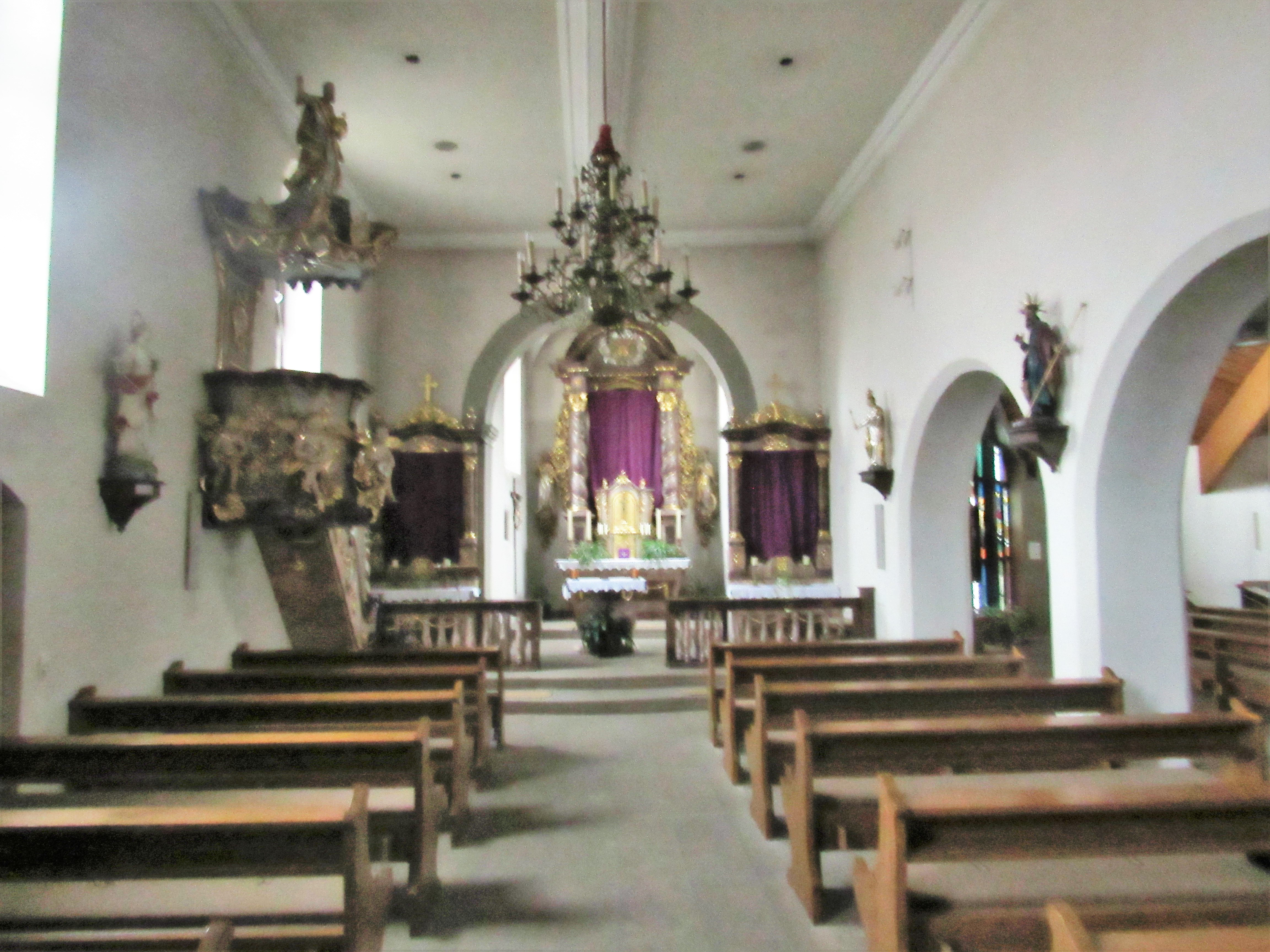 Altes Kirchenschiff